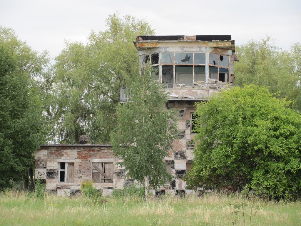 Термінал на авіабазі Чернігів